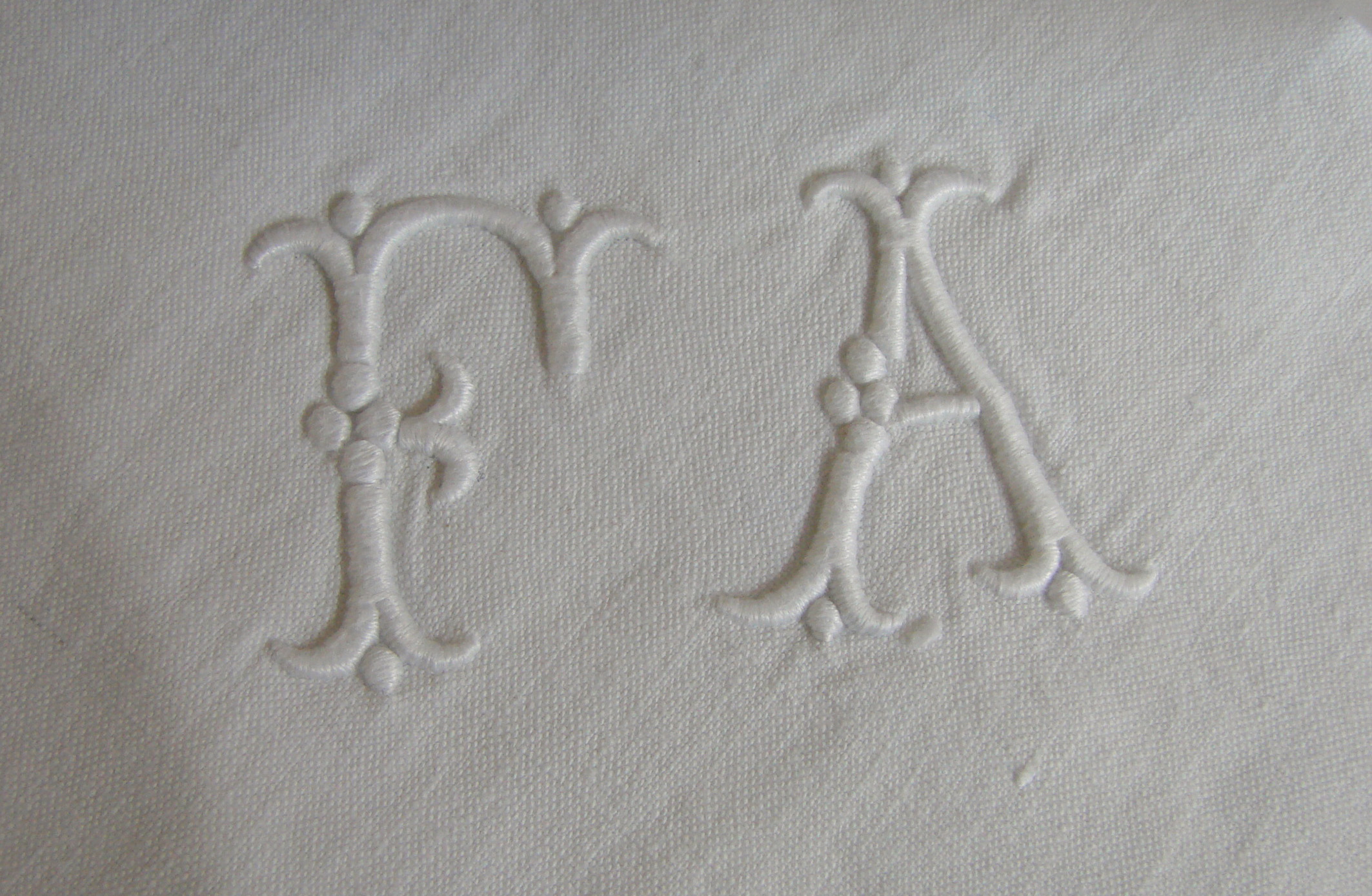 Lettres brodées.